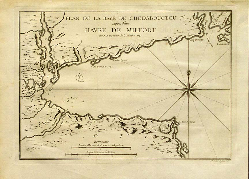 Carte de la baie de Chedabouctou en Acadie réalisée en 1744.